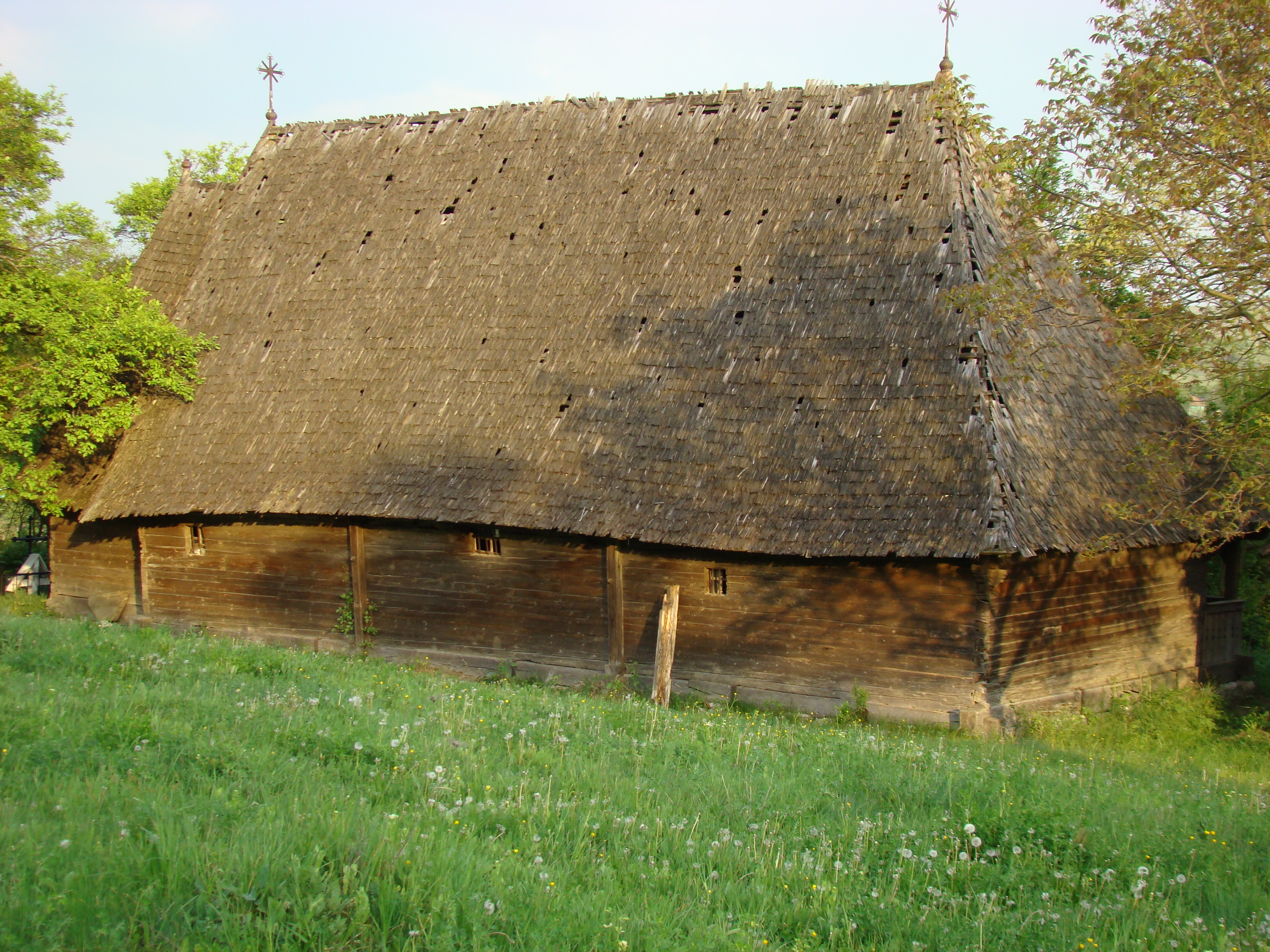 Biserica de lemn din Turdaș